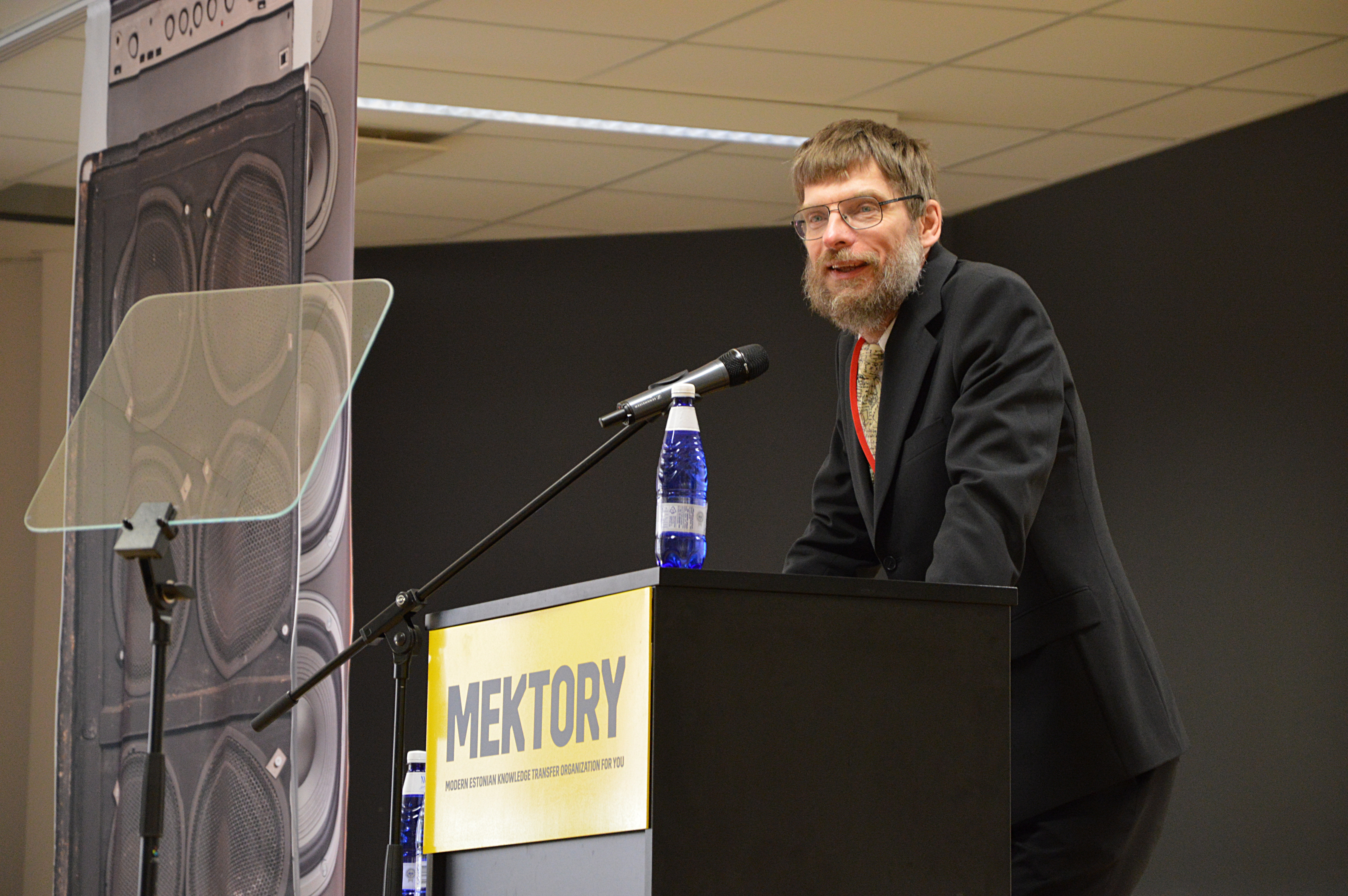 Jaan Kalda